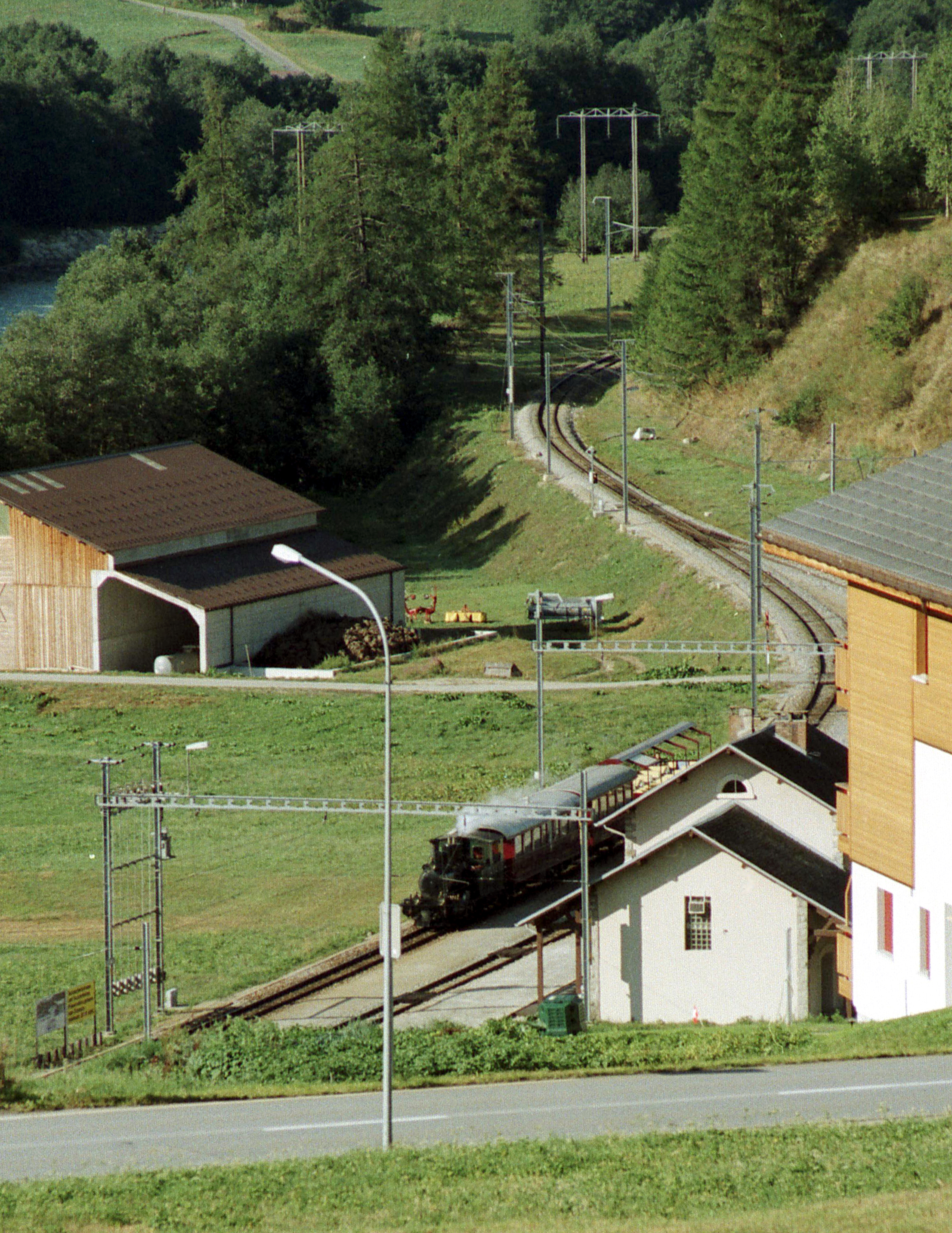 Dampfzug auf der MGBahn im Bahnhof Biel VS